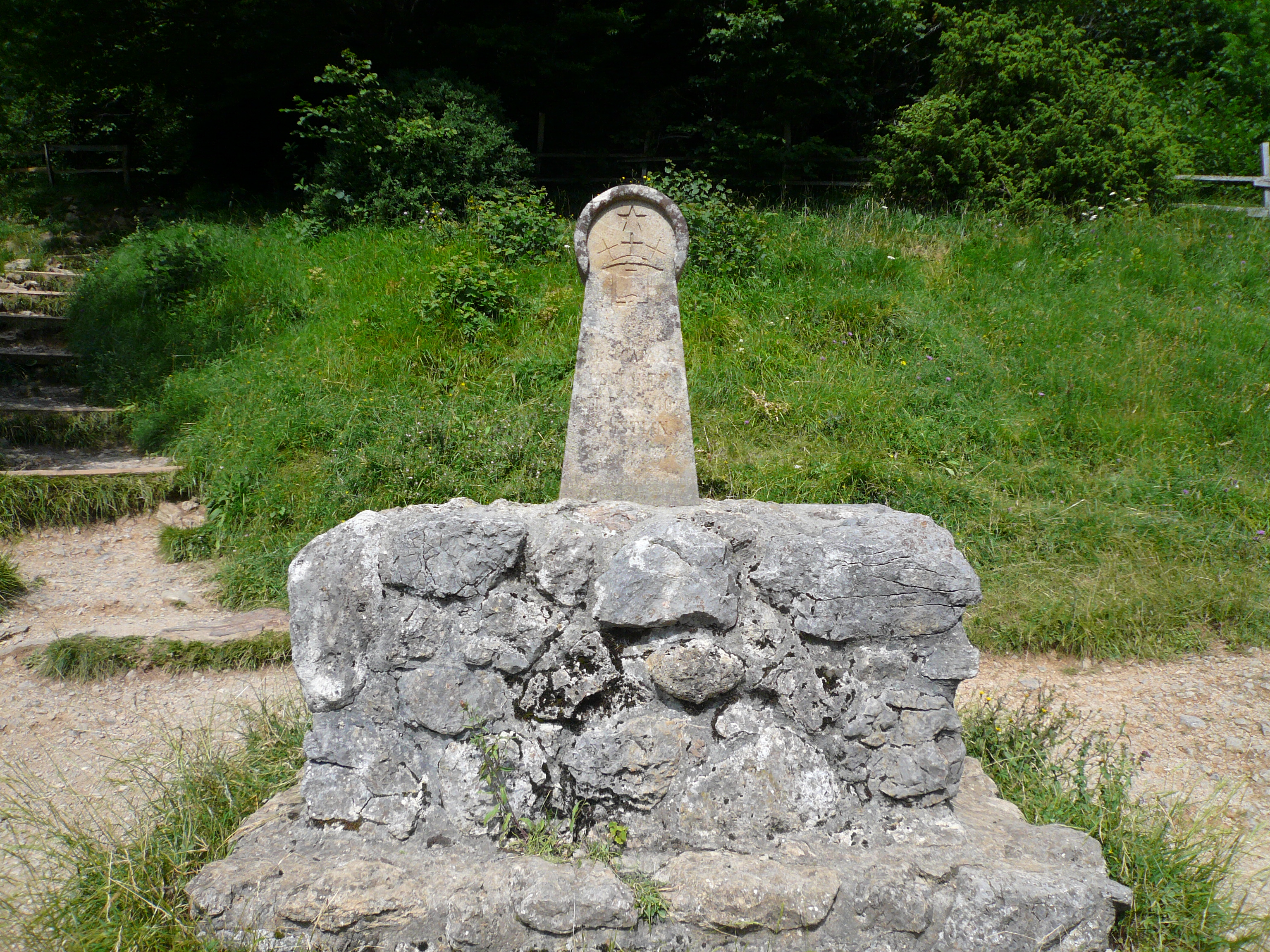 Monument commémoratif au pied du pog de Montségur (Ariège, Midi-Pyrénées, France).